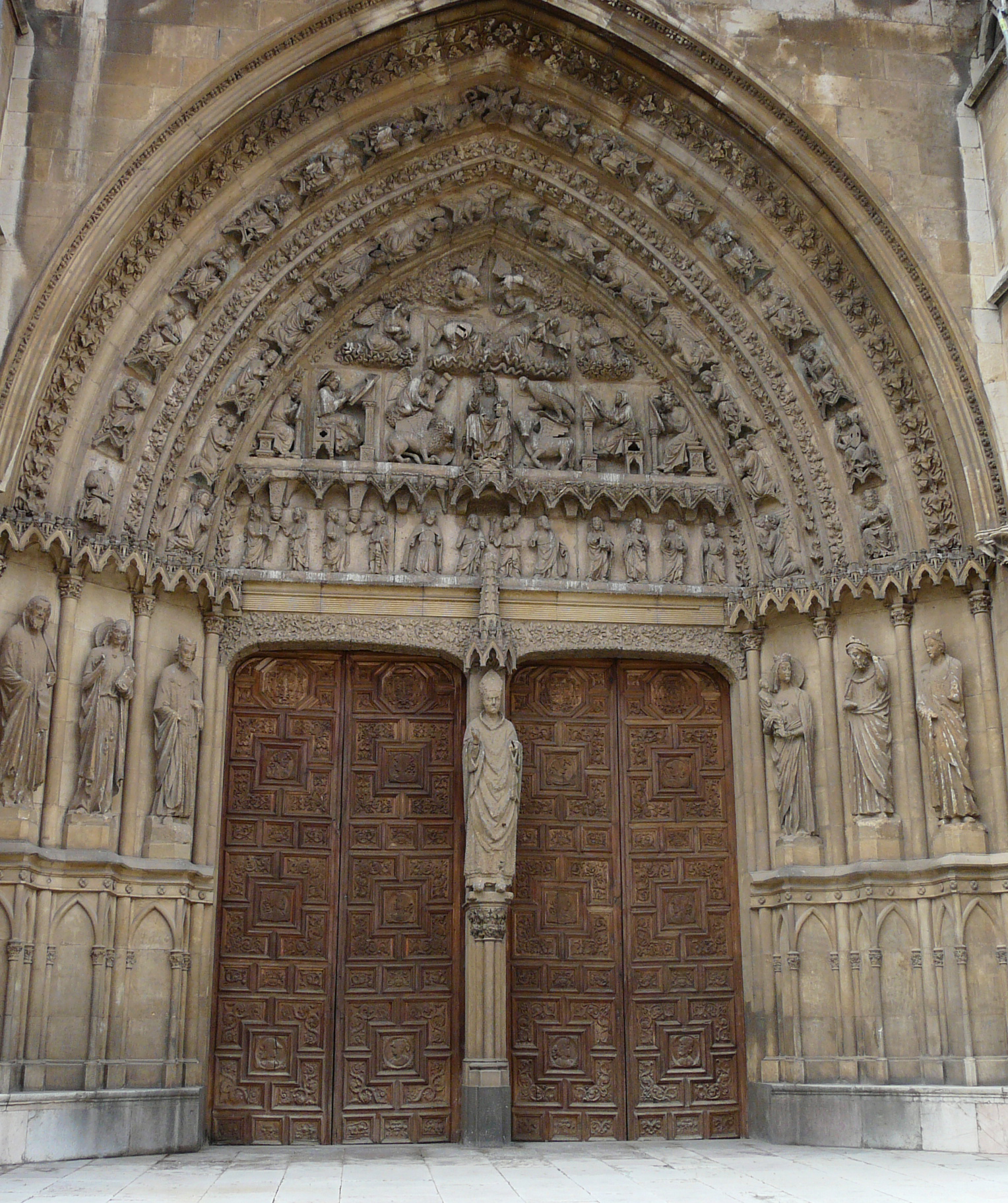 Pórtico central fachada sur Catedral de León